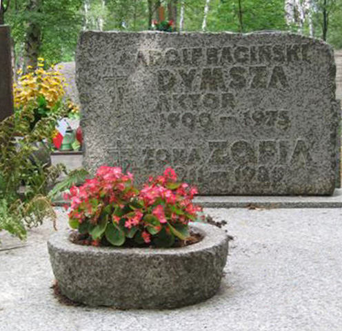 Adolf Dymsza's monument (Powązki Cemetery; Cmentarz Komunalny, d. Wojskowy)